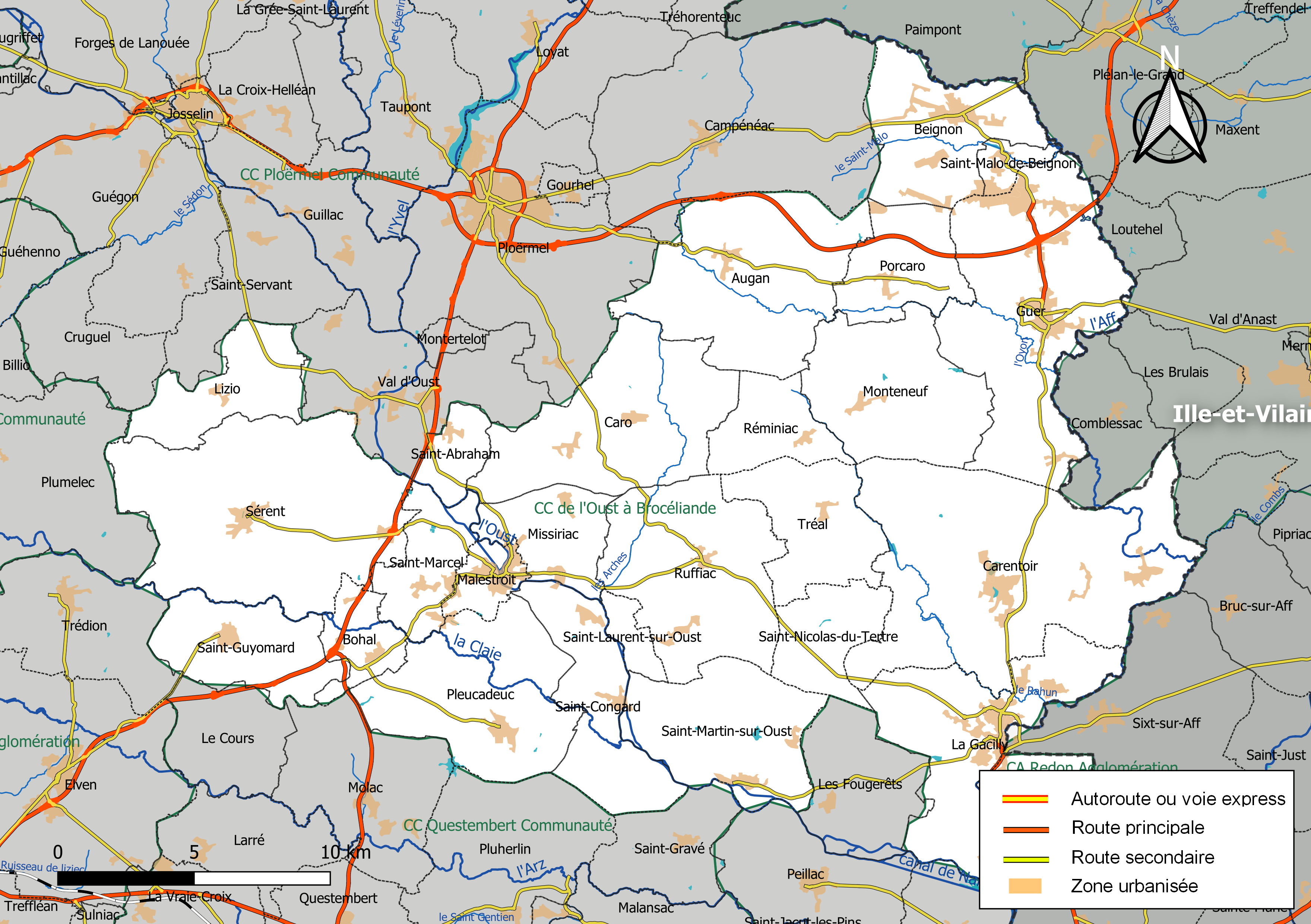 Carte géographique de l'intercommunalité De l'Oust à Brocéliande Communauté, département du Morbihan, France. Composition au 1er janvier 2019.